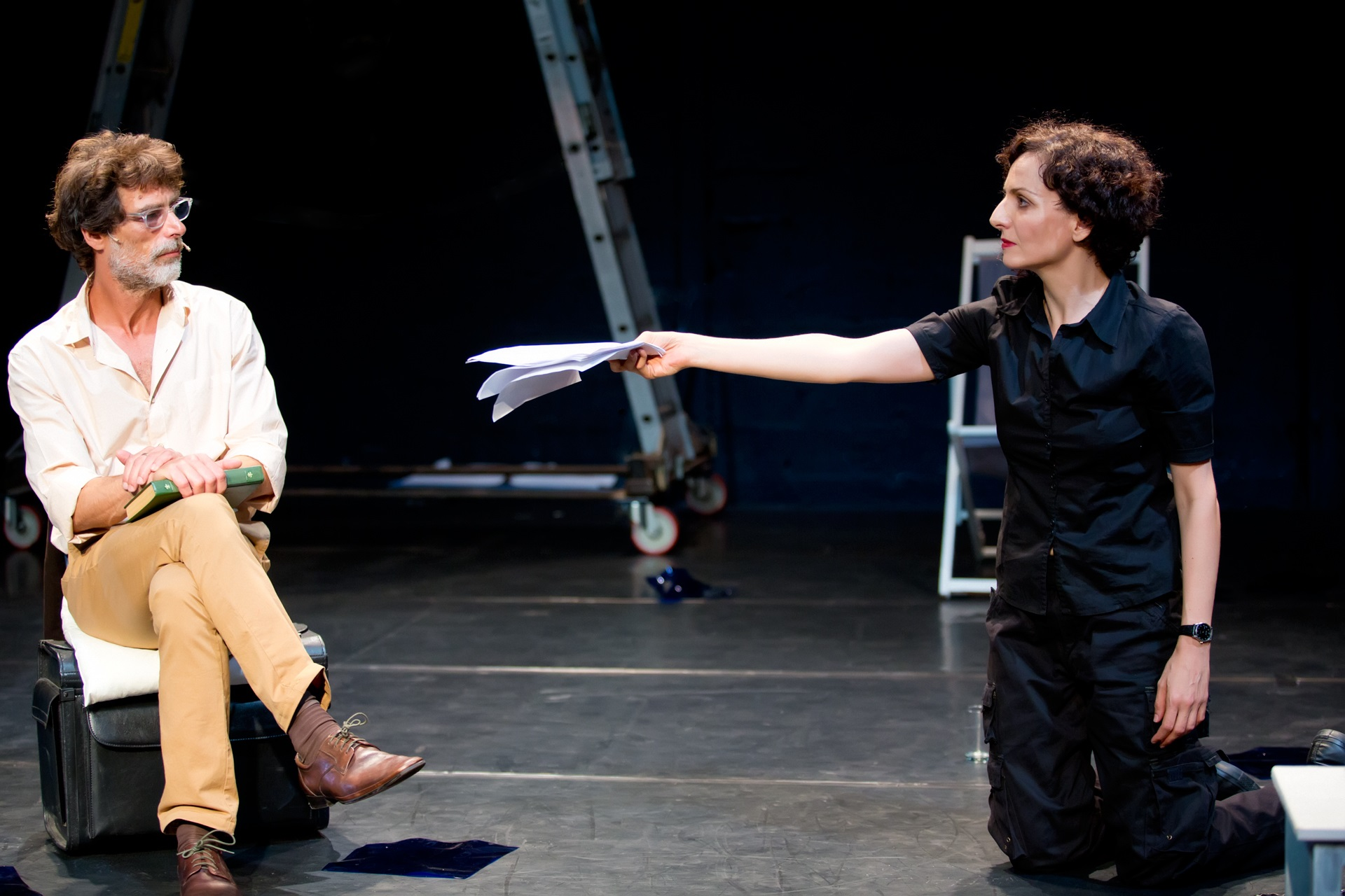 מיכל ויינברג ויורם יוספסברג בהשחף, 2013, צילום גדי דגון